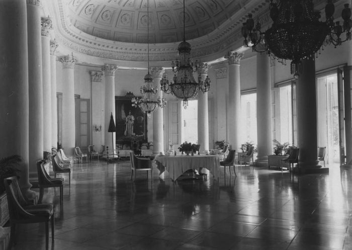 Foto. Zuilengalerij in het Paleis van de Gouverneur-Generaal te Buitenzorg